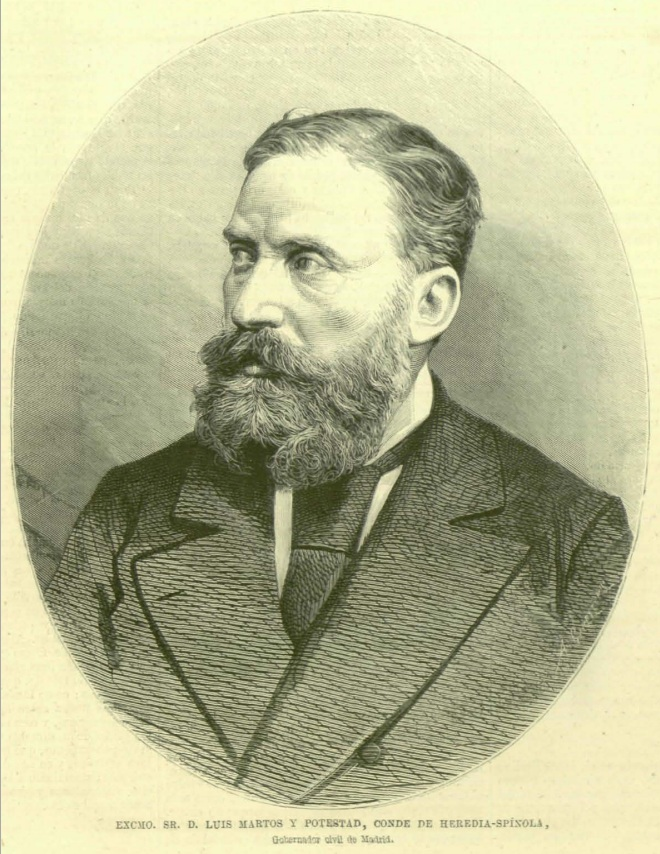 Excmo, Sr. D. Luis Martos y Potestad, Heredia-Spínola, gobernador civil de Madrid